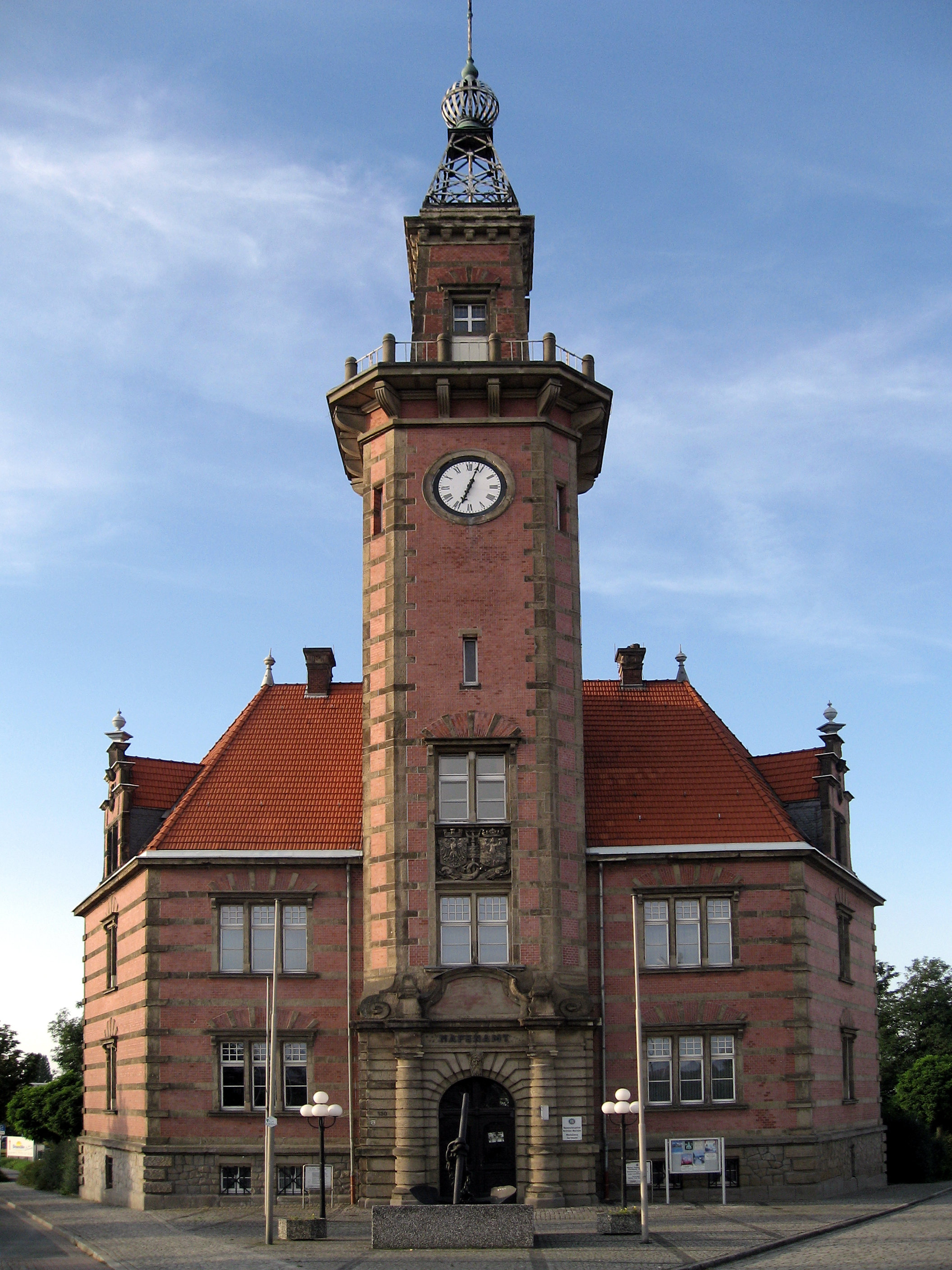 Dortmund, Nordstadt, Altes Hafenamt, Blick von der Hafenbrücke Richtung Norden